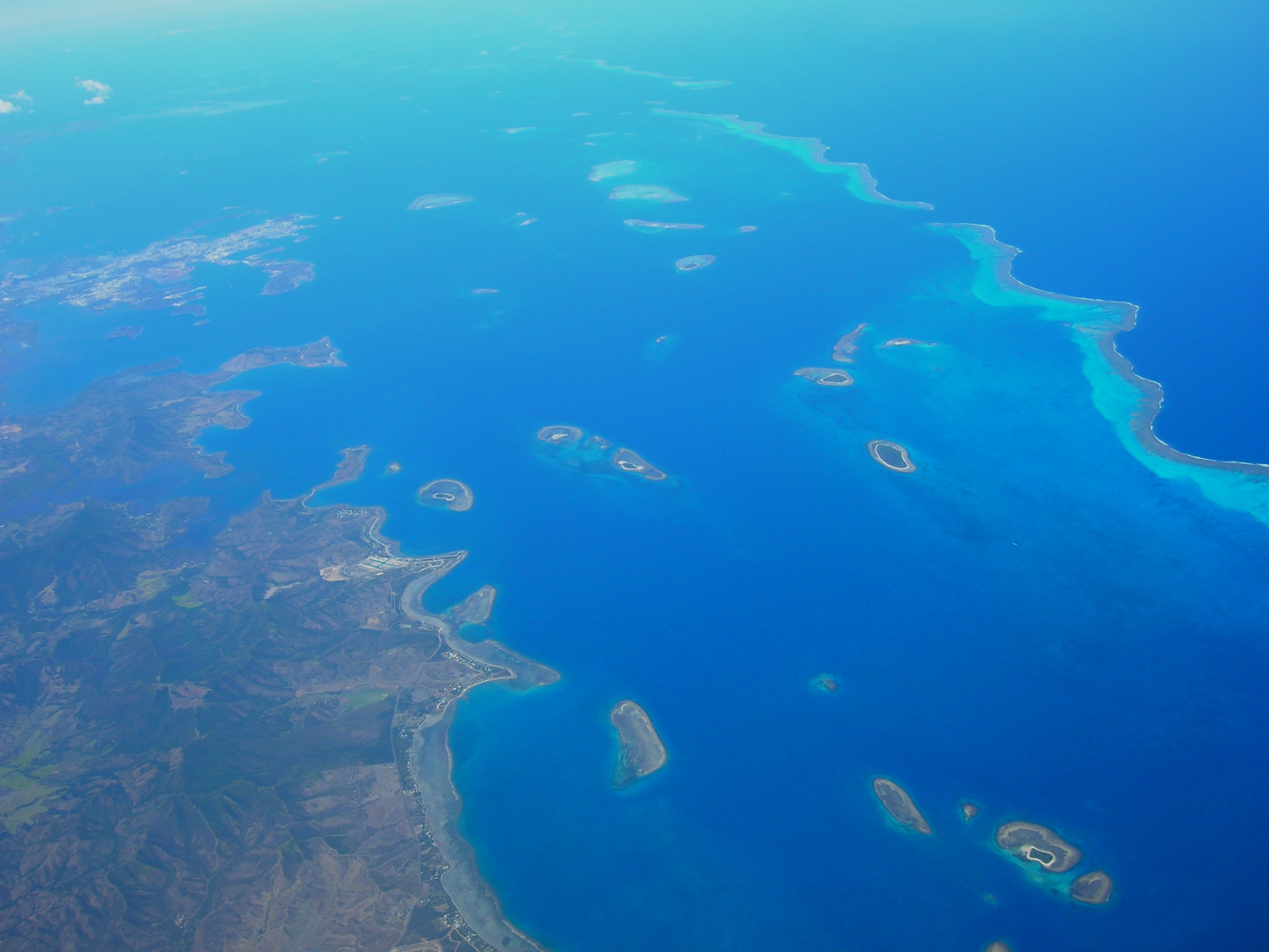 i090806 037